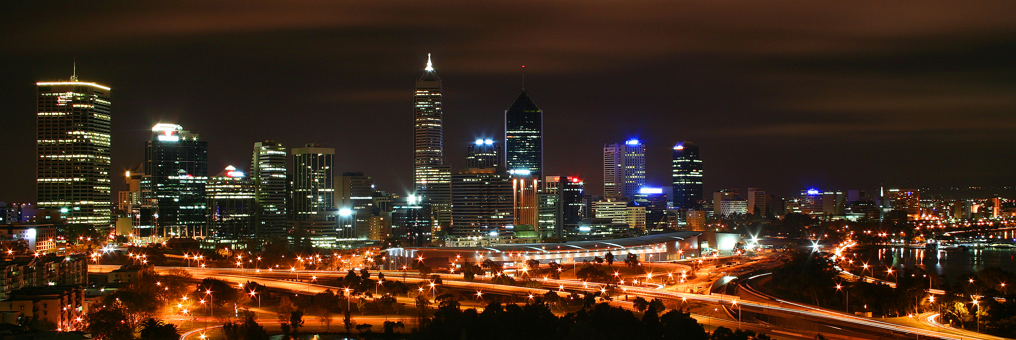 Skyline Perth bei Nacht